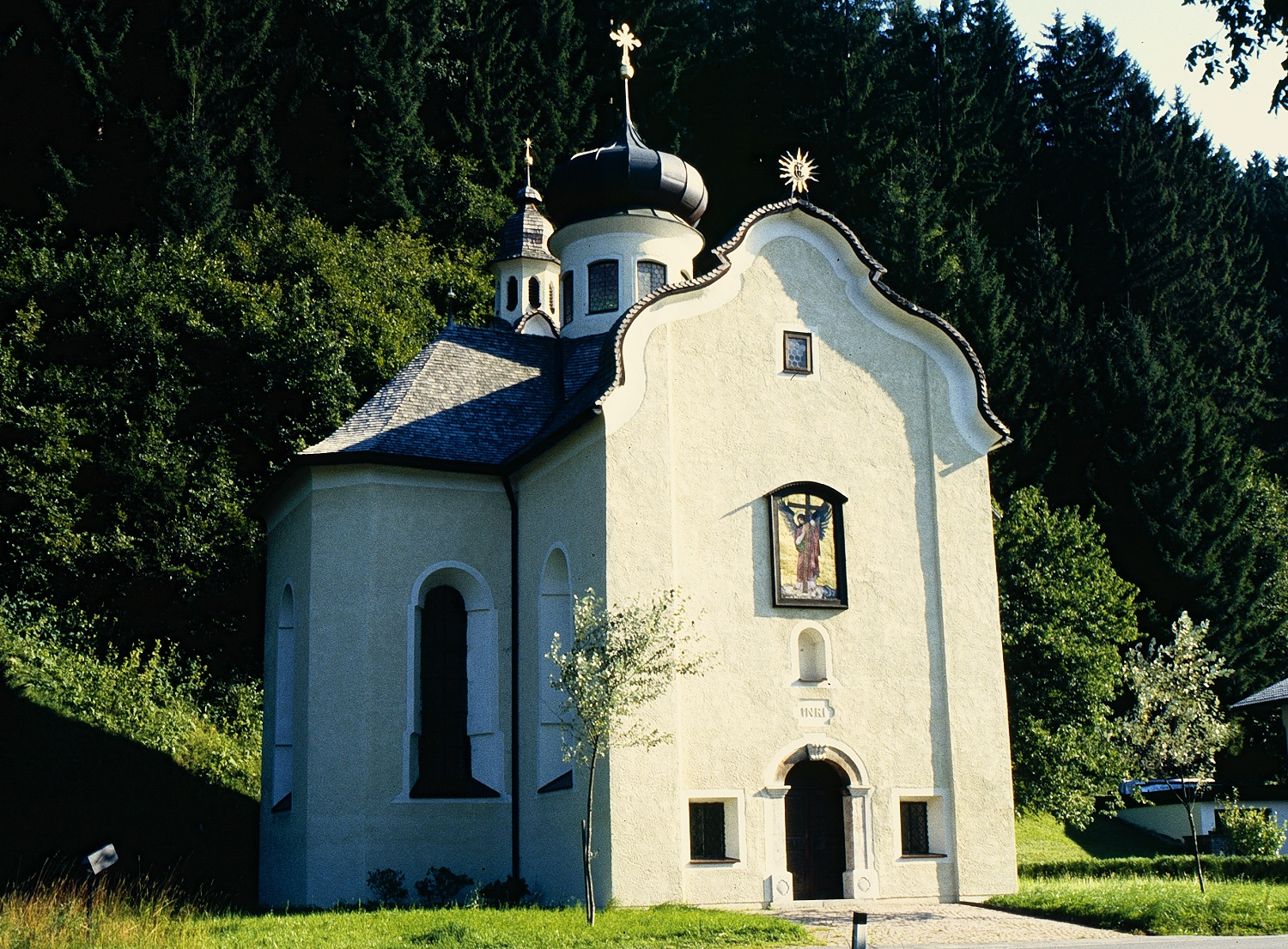 Wallfahrtskirche Heiligkreuz